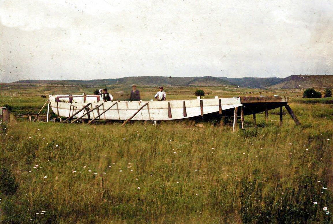 Einer der letzten Schelche die von der Familie Keidel in Knetzgau nach jahrhunderte alter Tradition gebaut worden sind